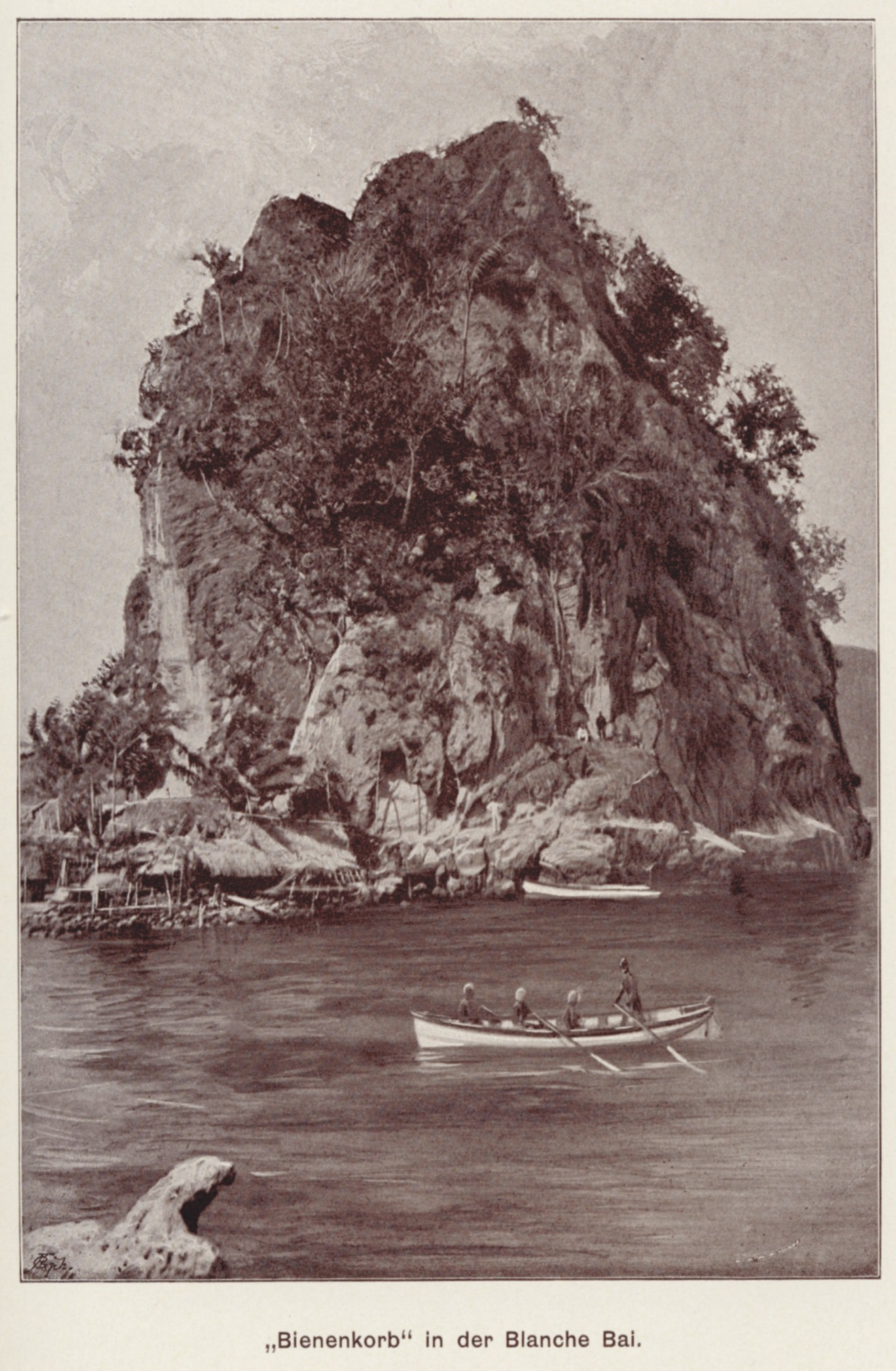 einer von drei "Bienenkörben" in der Blanche-Bai (Neubritannien, Papua Neu Guinea) (Aquarell von Joachim Graf Pfeil)